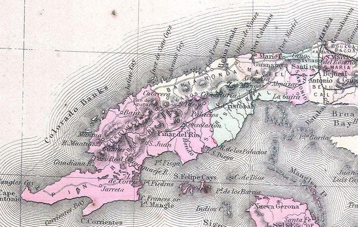 Mapa del occidente de Cuba en 861. Fragmento del Mapa de Johnson 1861 (Johnson's Map of Cuba, Jamaica, Porto Rico)